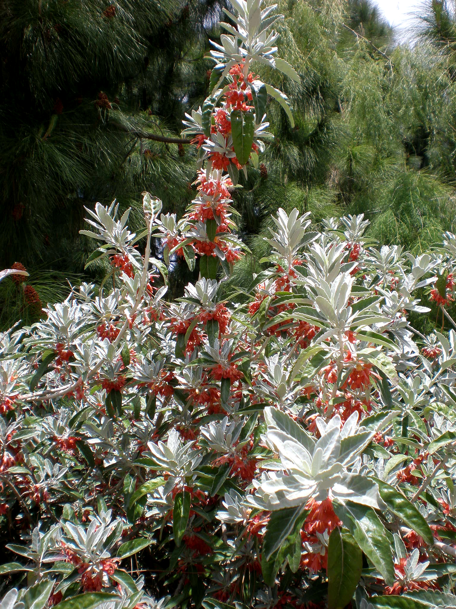 Jardín Botánico de Barcelona.